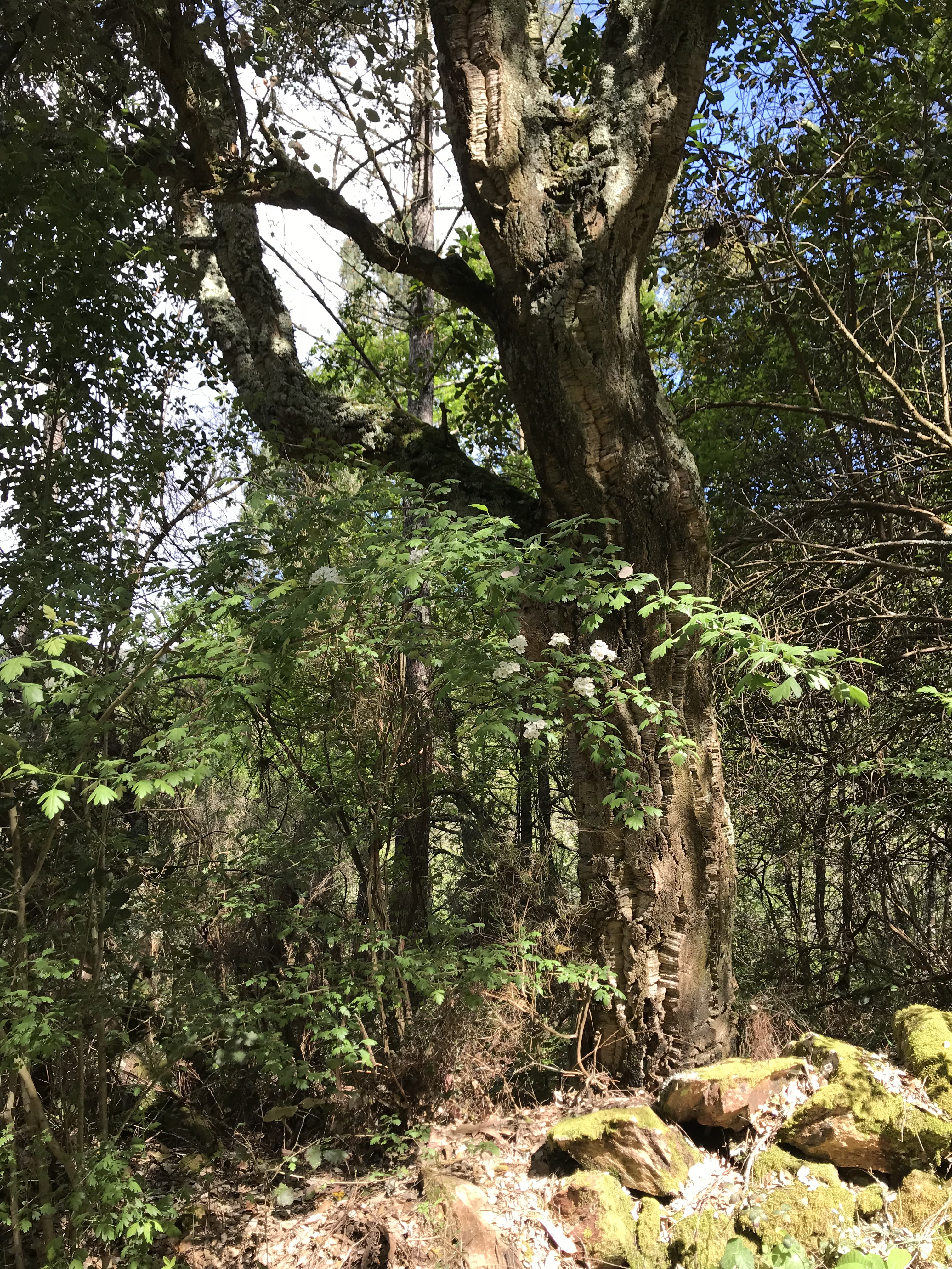 Sobreira no Arnego